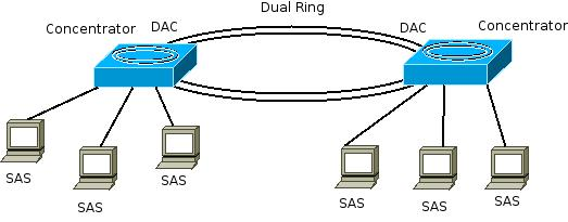 FDDI Dual Ring met concentrators